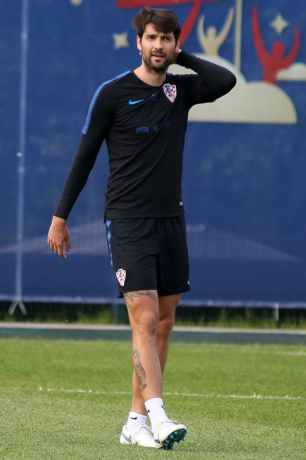 Сборная Хорватии провела первую тренировку в России